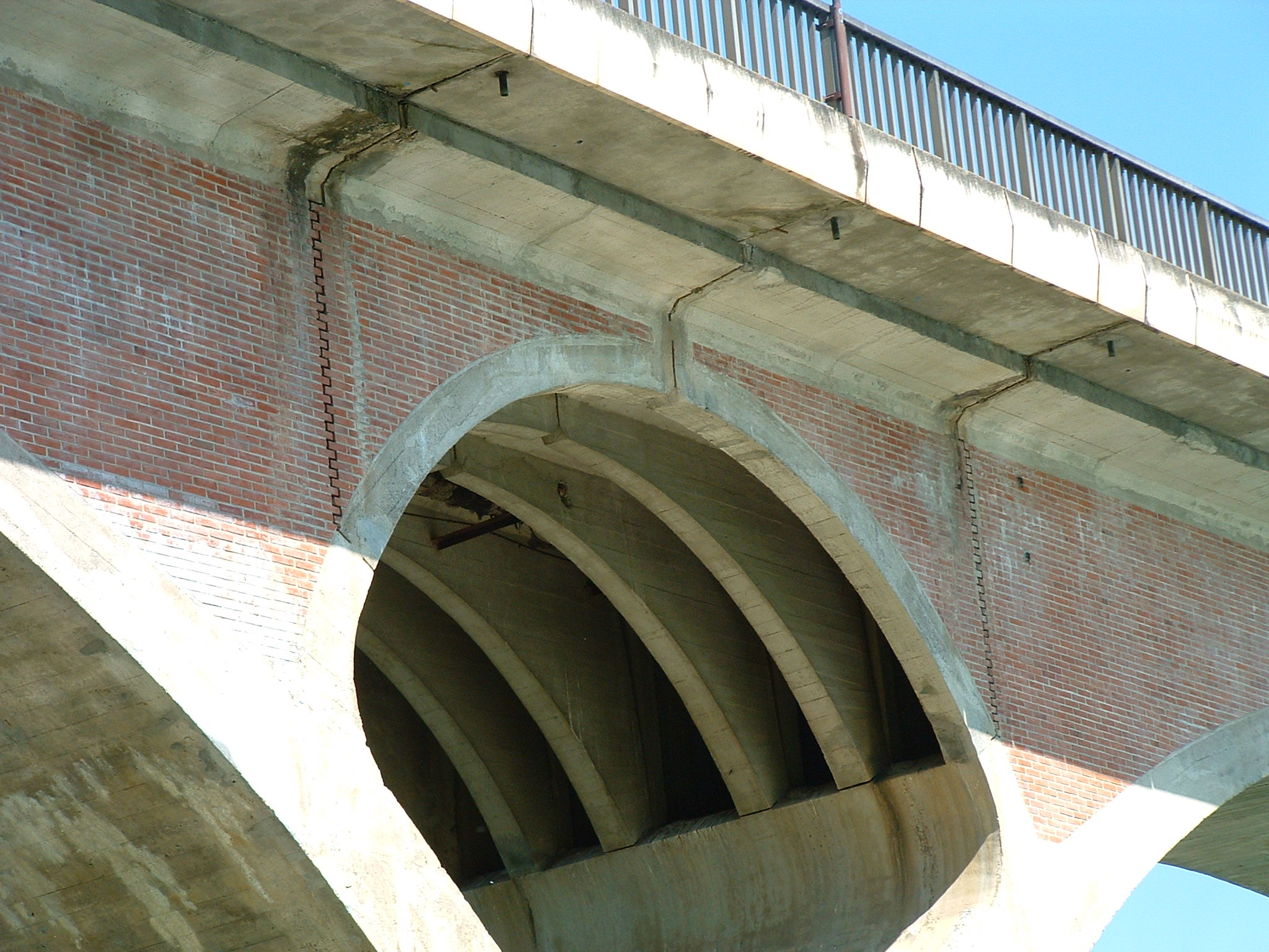 Tonneins - Pont sur la Garonne - Détail d'une pile